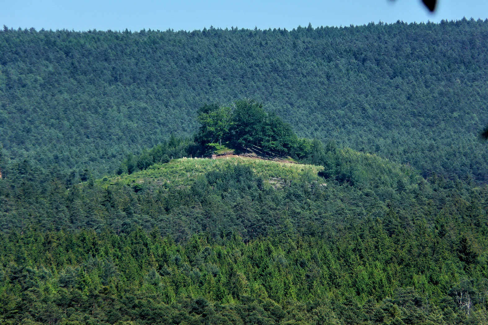 Dubový vrch z Mlýnského vrchu